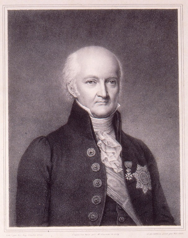 Bernard Frédéric, baron de Turckheim